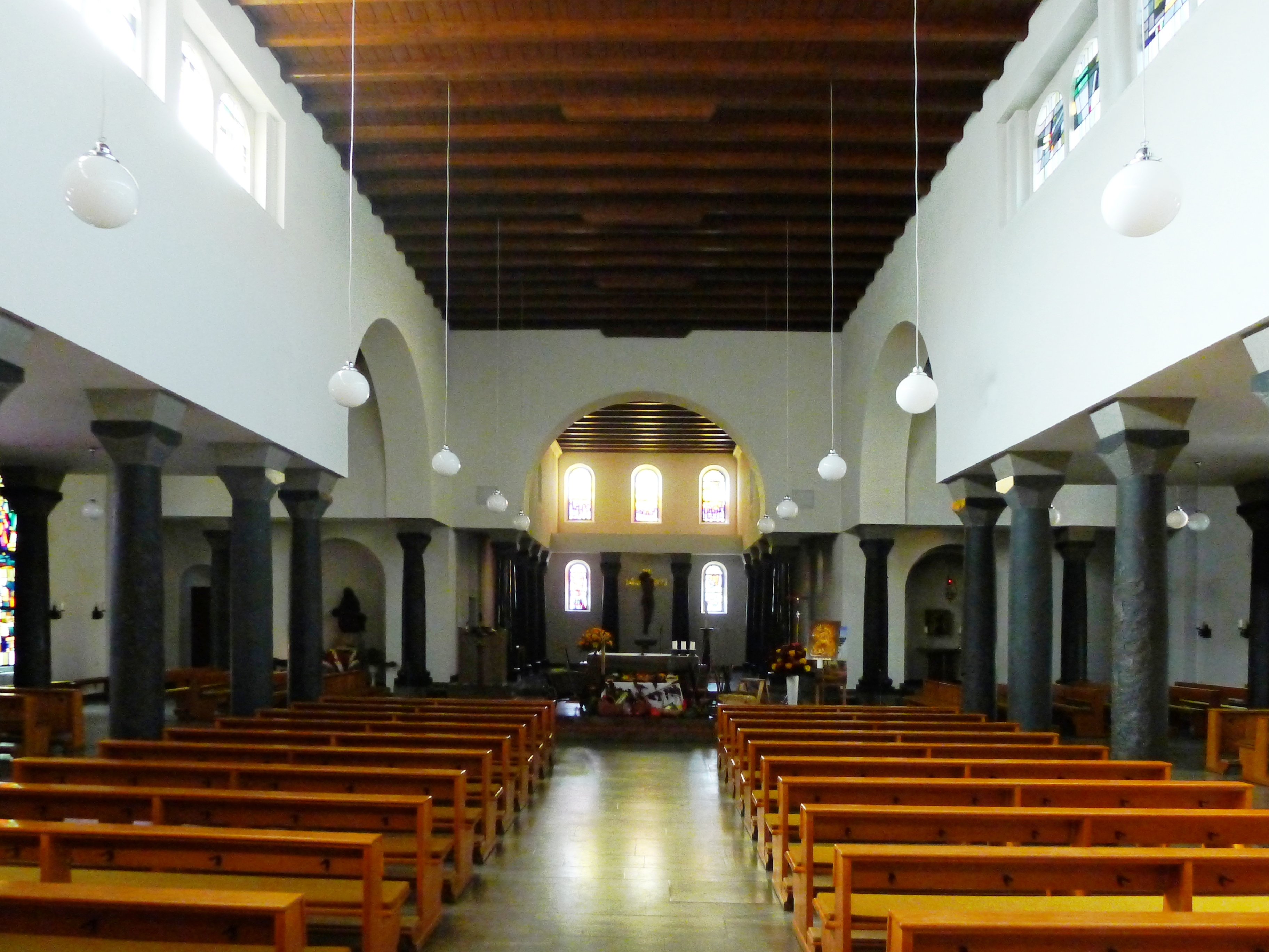 Blick vom Eingang in das Kirchenschiff